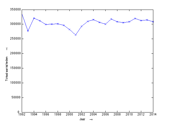 Gezamenlijk aantal leden van Politieke partijen in Nederland, gebaseerd op [1]